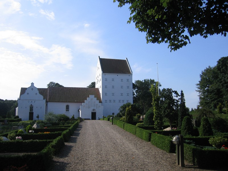 Aasted Kirke, Frederikshavn Provsti, Aalborg Stift